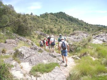 Senderos en la Provincia de Córdoba, Argentina